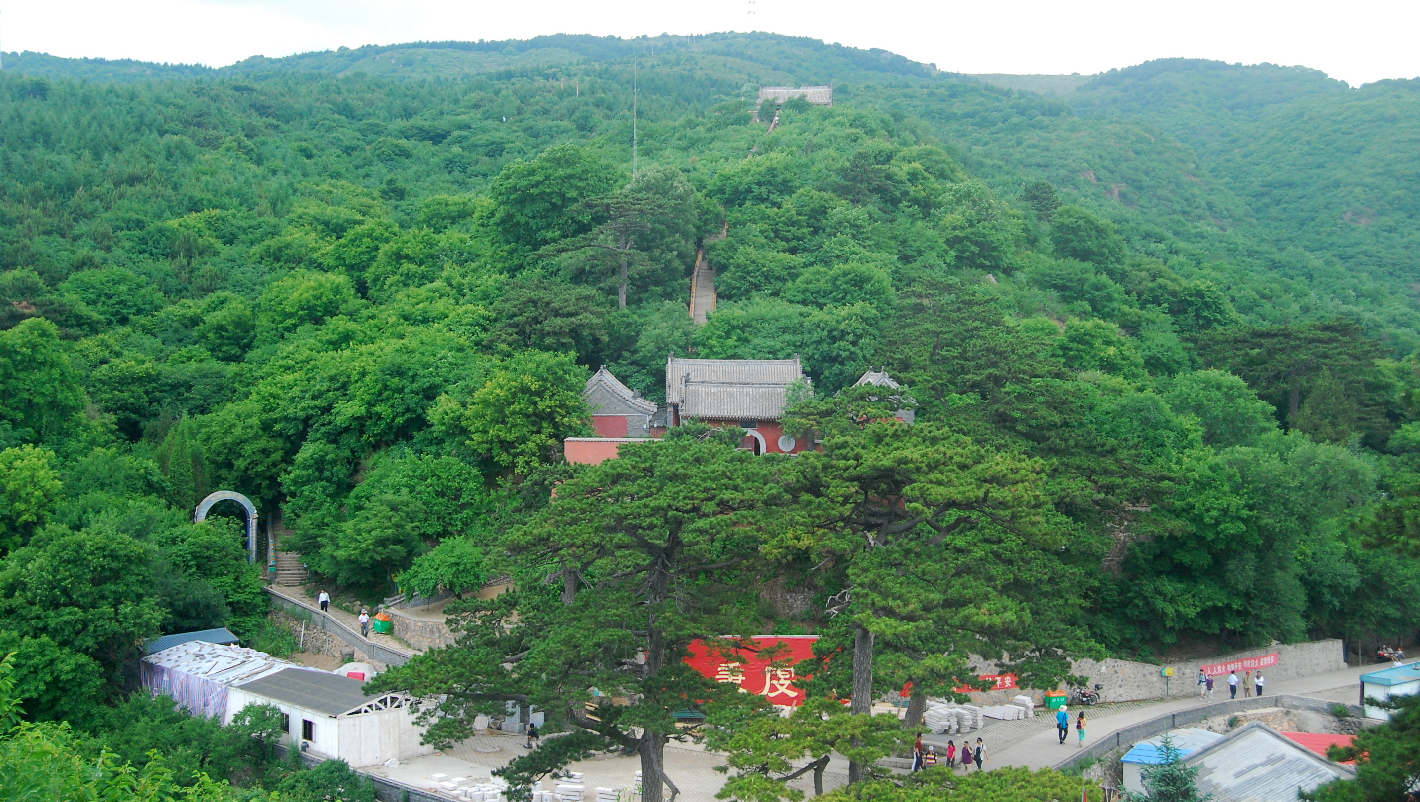 妙峰山全景